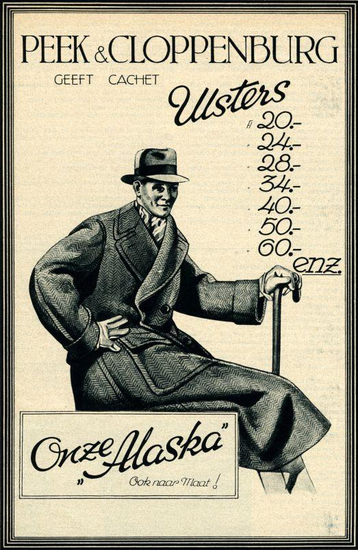 Nationaal Archief / Spaarnestad Photo / Fotograaf onbekend, SFA003002380. Herenmode. Advertentie voor ulsters (herenoverjassen) van kledingwinkel Peek & Cloppenburg in het tijdschrift 'De Stad Amsterdam', 6 november 1931. Illustratie, man in visgraat overjas met dubbele rij knopen. Gents' fashion. Advertisement for gentlemens' coats (ulsters) in the Dutch magazine 'De Stad Amsterdam' ('Amsterdam city'), 1931. Illustration showing a man wearing a double breasted coat. Collectie Spaarnestad Voor meer informatie en voor meer foto’s uit de collectie van Spaarnestad Photo, bezoek onze Beeldbank: U kunt ons helpen onze kennis van de fotocollecties te verrijken door tags en commentaren toe te voegen. Herkent u mensen of locaties of heeft u een bijzonder verhaal te vertellen bij één van de foto’s, laat dan een reactie achter (als u ingelogd bent bij Flickr) of stuur een mailtje naar: You can help us gain more knowledge on the content of our collection by simply adding a comment with information. If you do not wish to log in, you can write an e-mail to